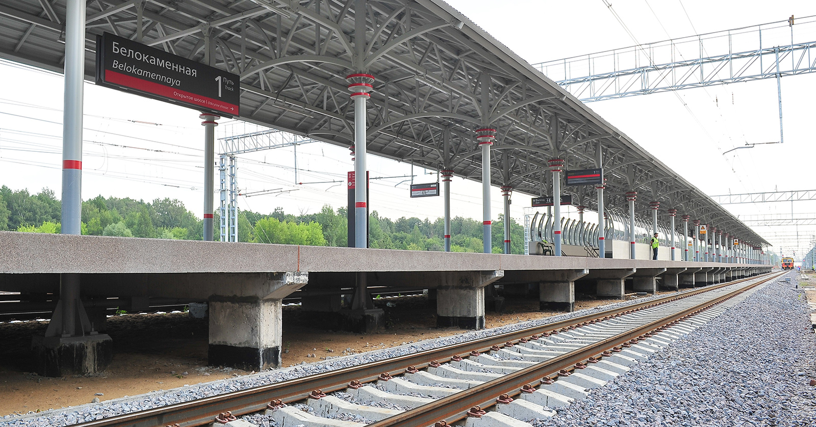 Пассажирская платформа станции Белокаменная